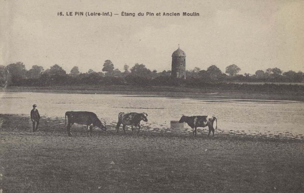 Carte postale illustrant l'étang du Pin, Loire-Atlantique, France.